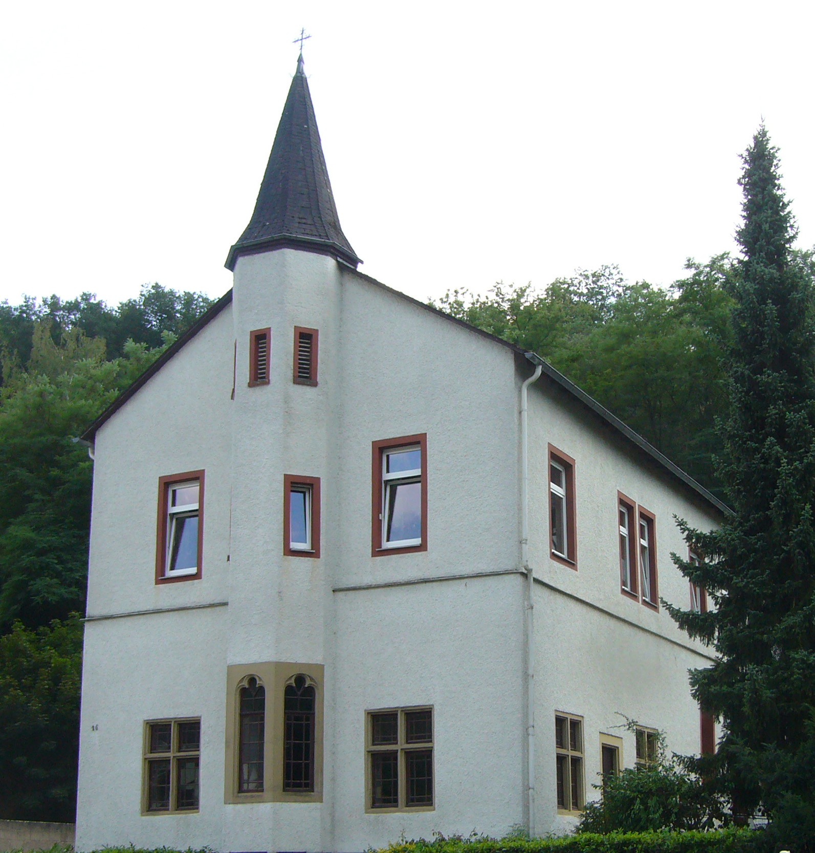 Altenwohnheim Arienhellerstr. Rheinbrohl